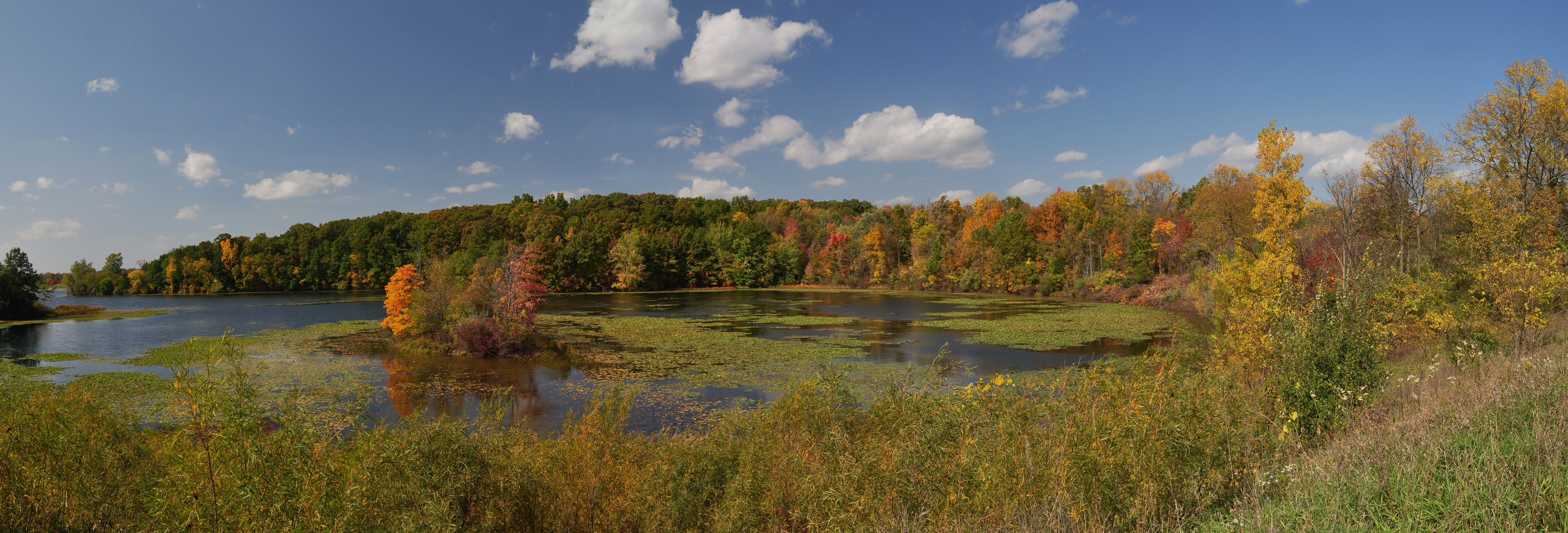 Seven Lakes State Park